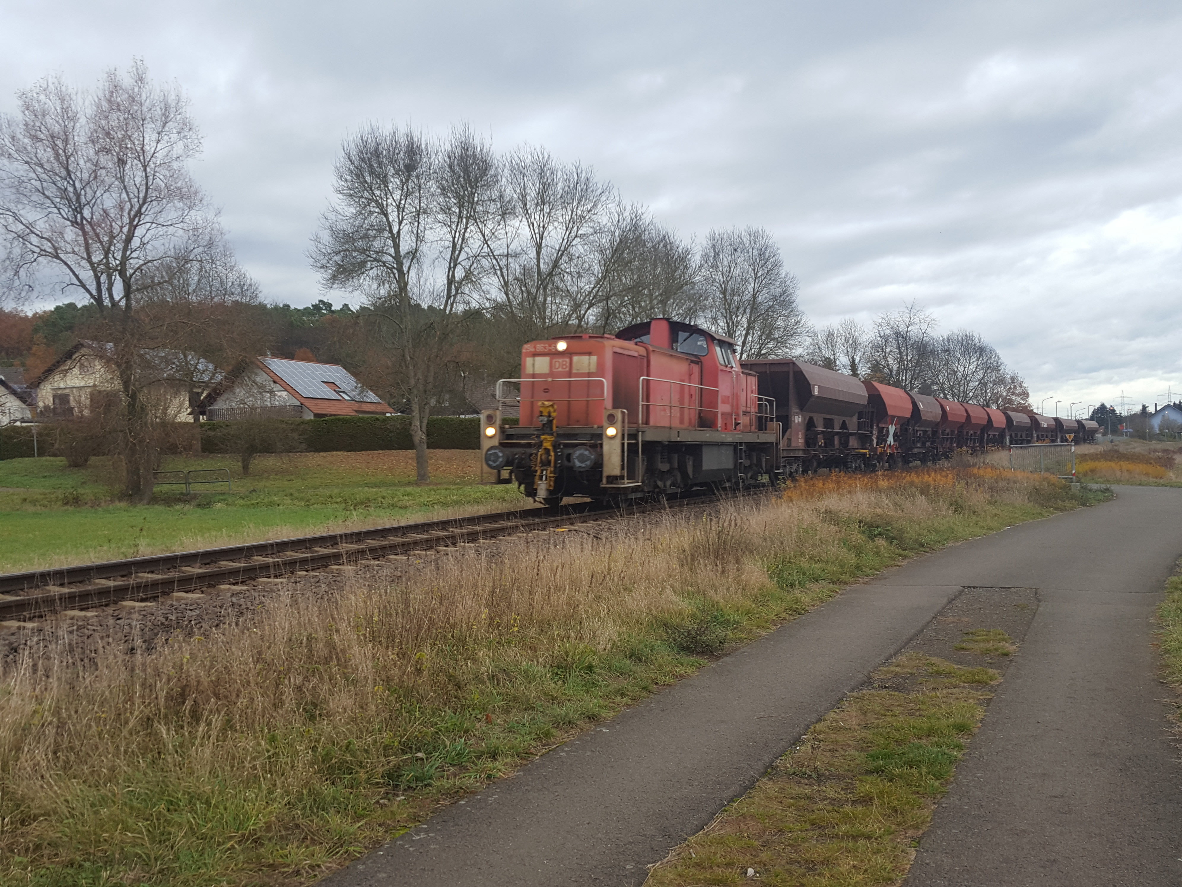 Güterzug Rammelsbach Express